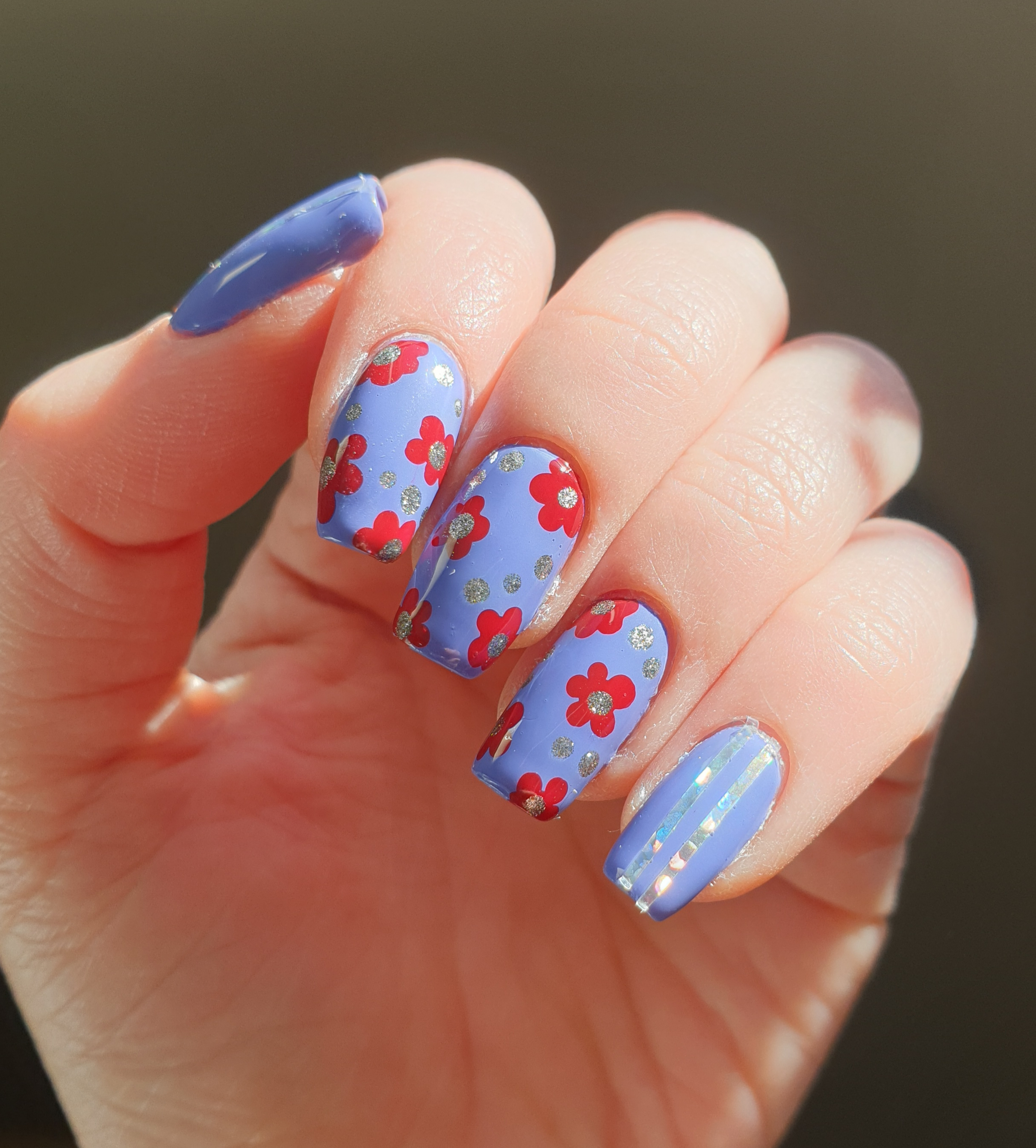 En bild av målade naglar.